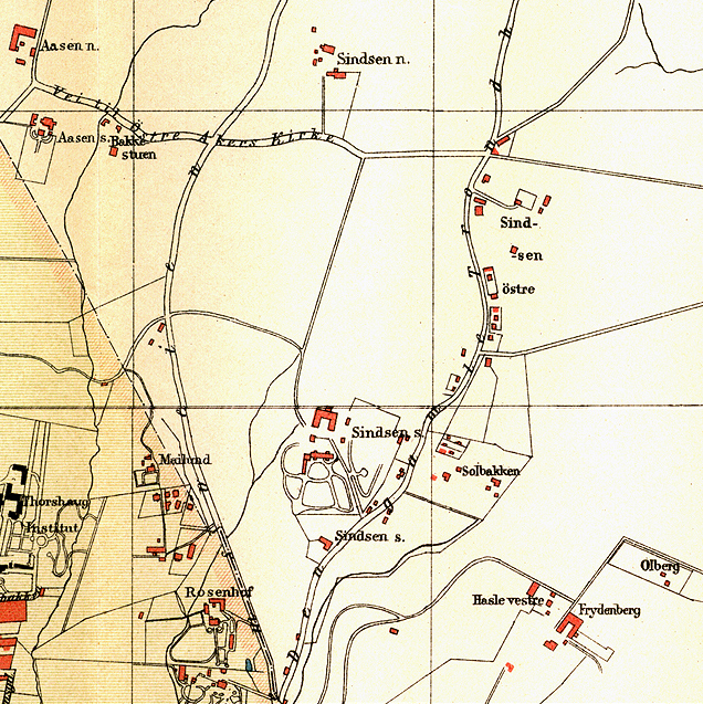 Kart over Sinsen i Østre Aker, 1887